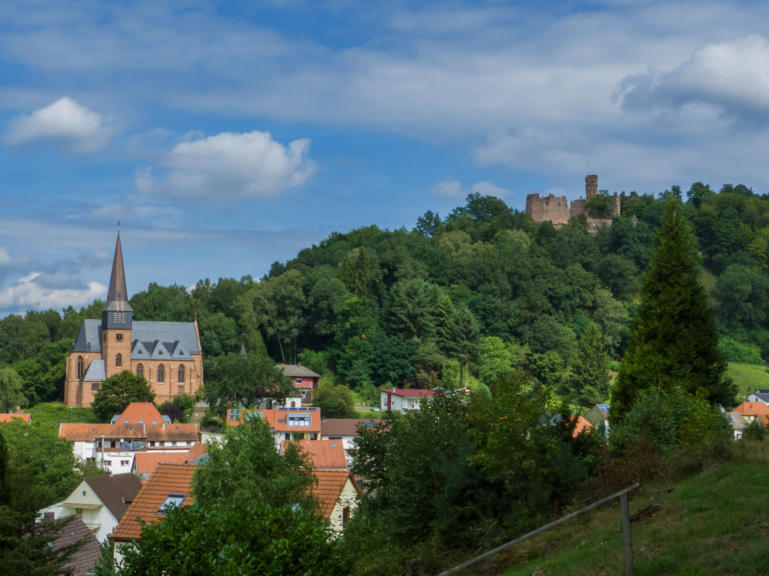 Hohenecken - Pfarrkirche St. Rochus und Burg Hohenecken